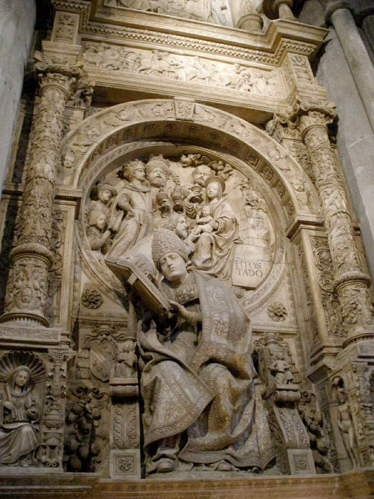 Sepulcro del prelado espáñol Alonso Fernández de Madrigal (1410-1455), Obispo de Ávila y conocido como el Tostado. Se encuentra en la catedral de Ávila, (España), y fue realizado en 1520 por Vasco de la Zarza.